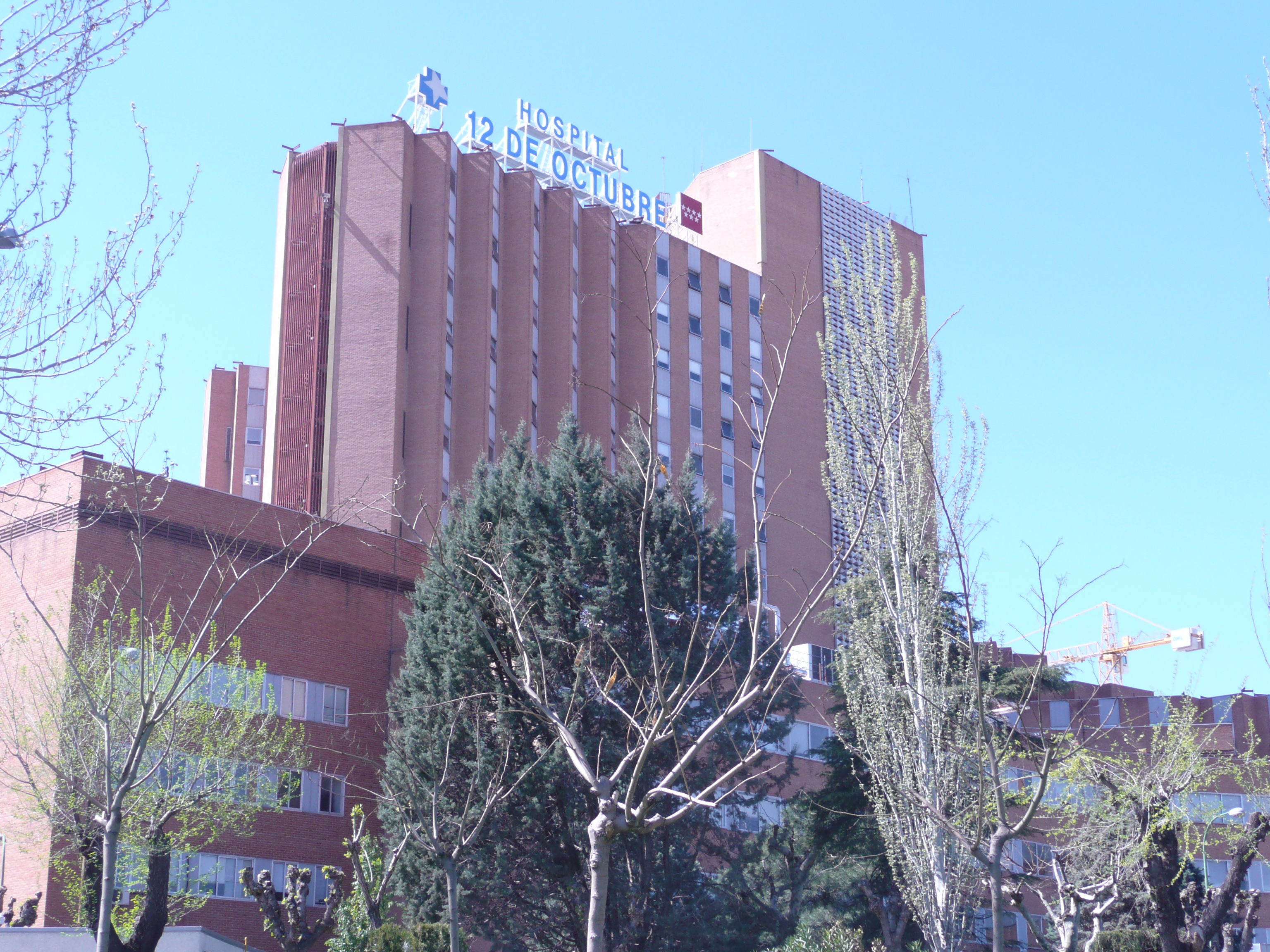 Vista exterior del Hospital 12 de Octubre en Madrid. - Alquiler de coches en Madrid